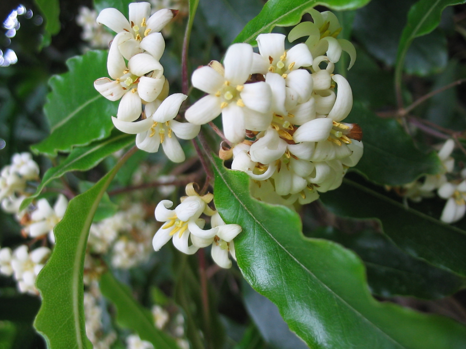 Klebsame (Pittosporum undulatum) - Flower